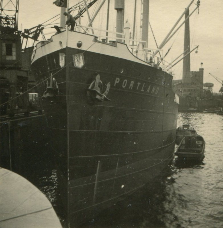 Das Schiff PORTLAND (1928 - 1943) - Reederei: Hamburg – Amerika Linie ( HAPAG ) - Historische Aufnahme aus den 1940er Jahren